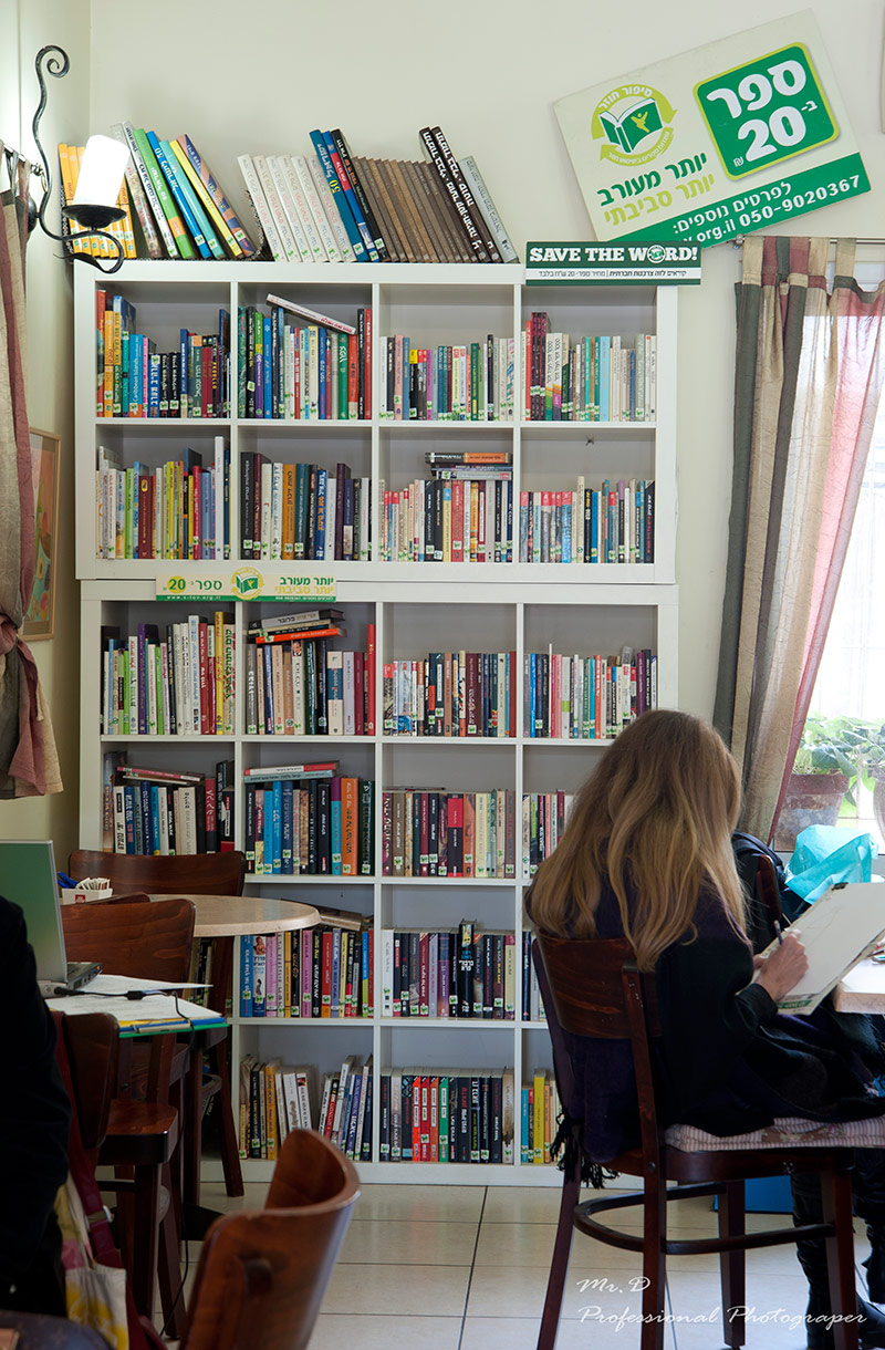 תחום סיפור חוזר בקבוצת שכולו טוב